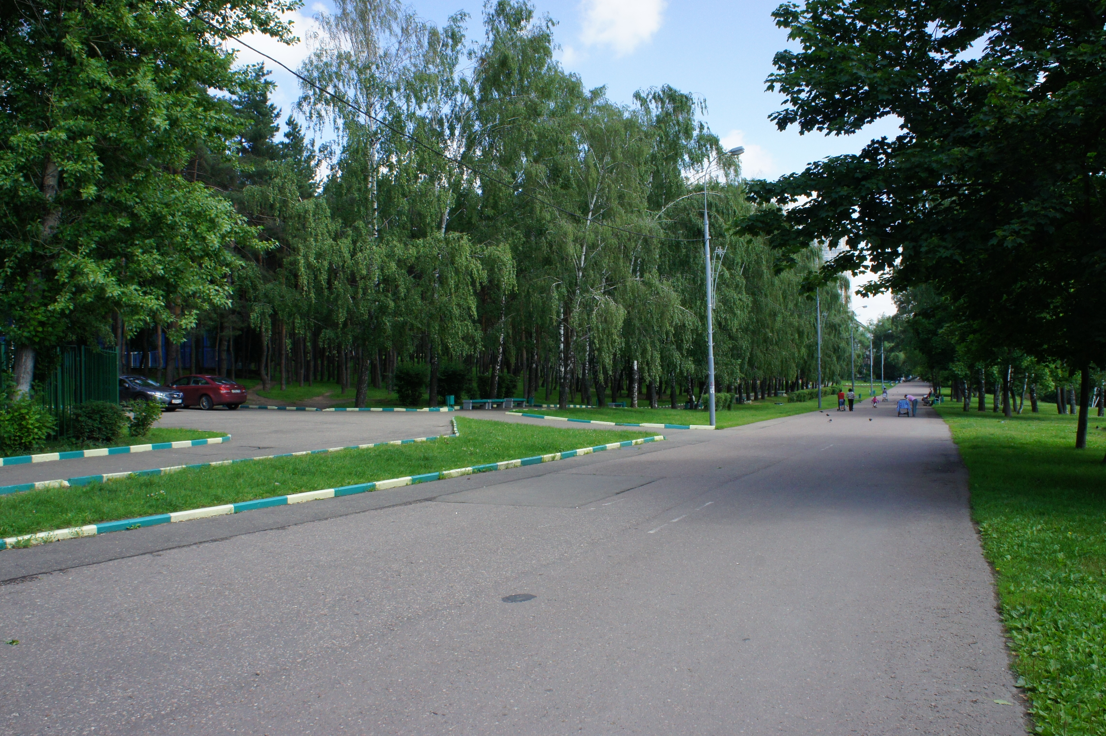 Парк «Сосенки» в Москве.